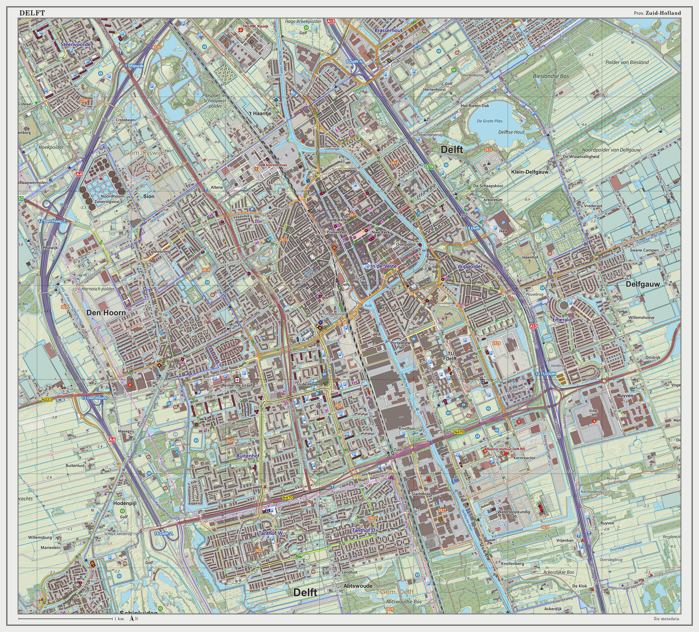 Topografische kaart van Delft (woonplaats). Resolutie: 300 pixels/km. Kaartbeeld samengesteld uit de open geodata van de Top10NL en Top25namen (Basisregistratie Topografie, Kadaster), Creative Commons BY licentie. Gebouwvlakken uit open geodata BAG extract. Wegen uit de OpenStreetMap. Reliëfschaduw uit de Actuele Hoogtekaart AHN2. Samenstelling en kleurenschema: Jan-Willem van Aalst, met QGIS2. Zie ook de Legenda.